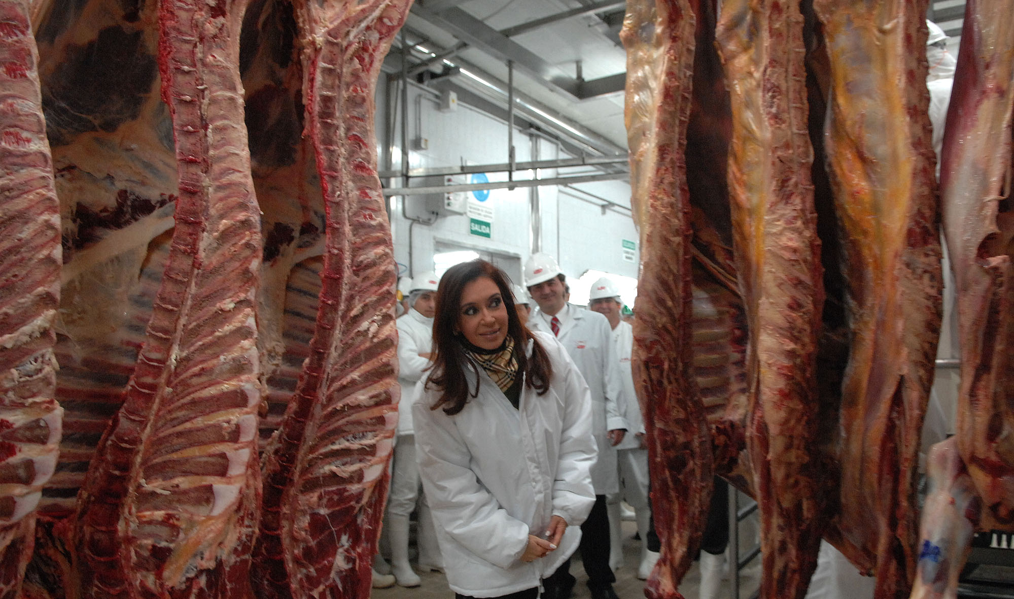 Cristina Kirchner inaugurando el frigorífico Swift en Pontevedra.